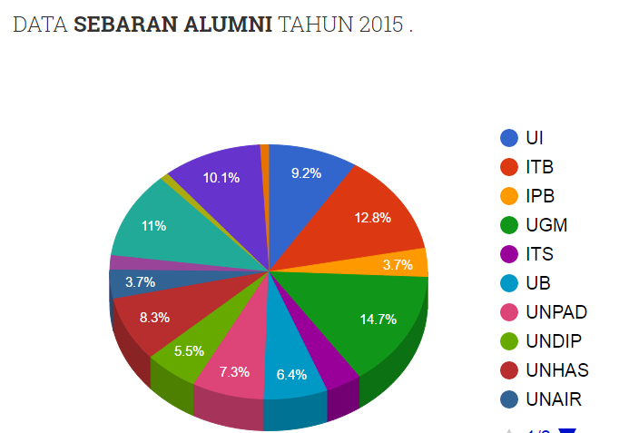 Sebaran Alumni MAN Insan Cendekia Gorontalo pada tahun 2015